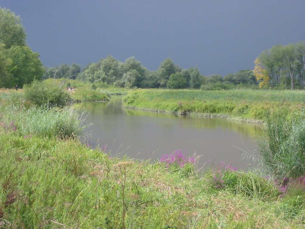 Nationaal Park De Biesbosch